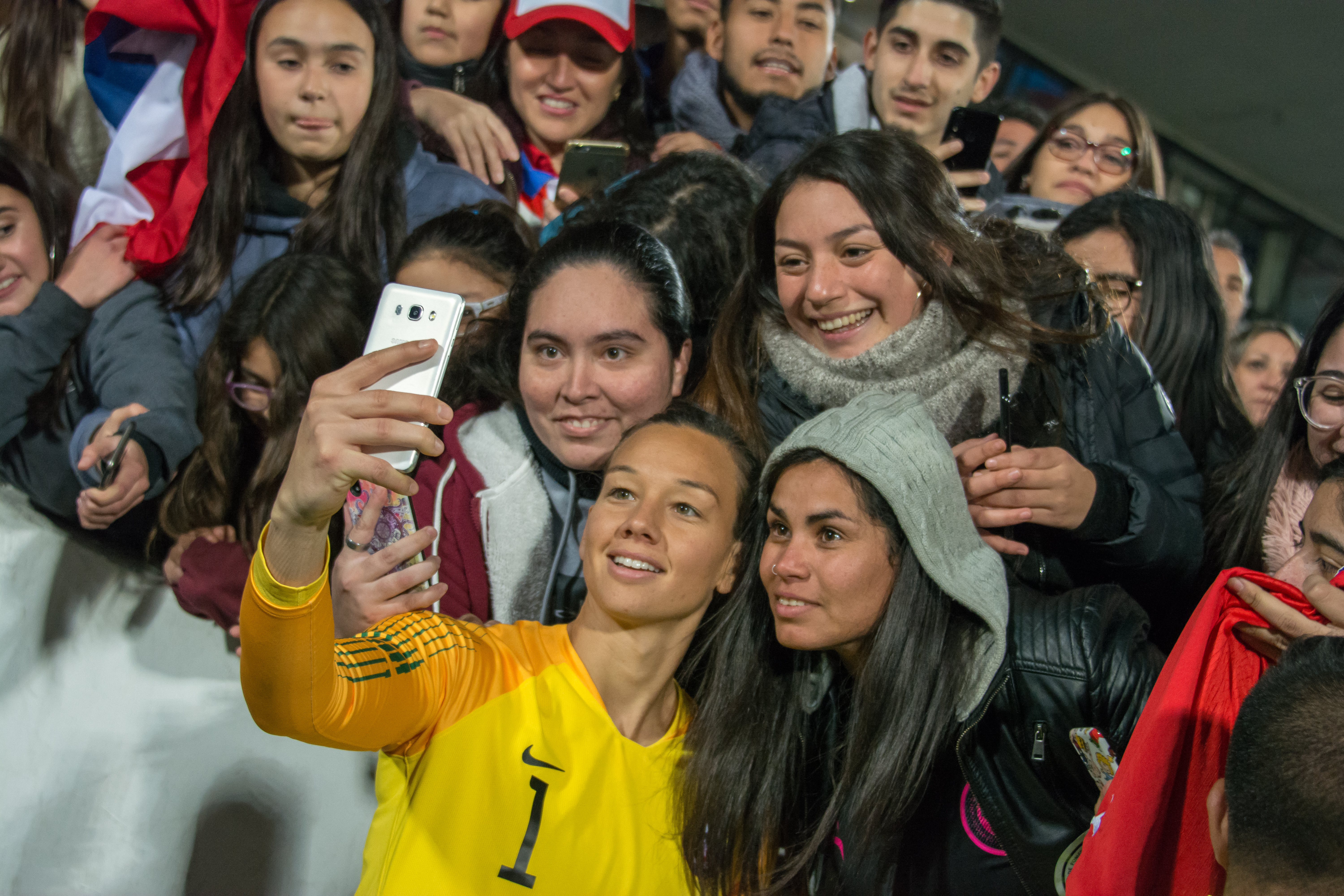 Christiane Endler, Chile v Colombia, Estadio Nacional, Ñuñoa, Santiago, Chile.